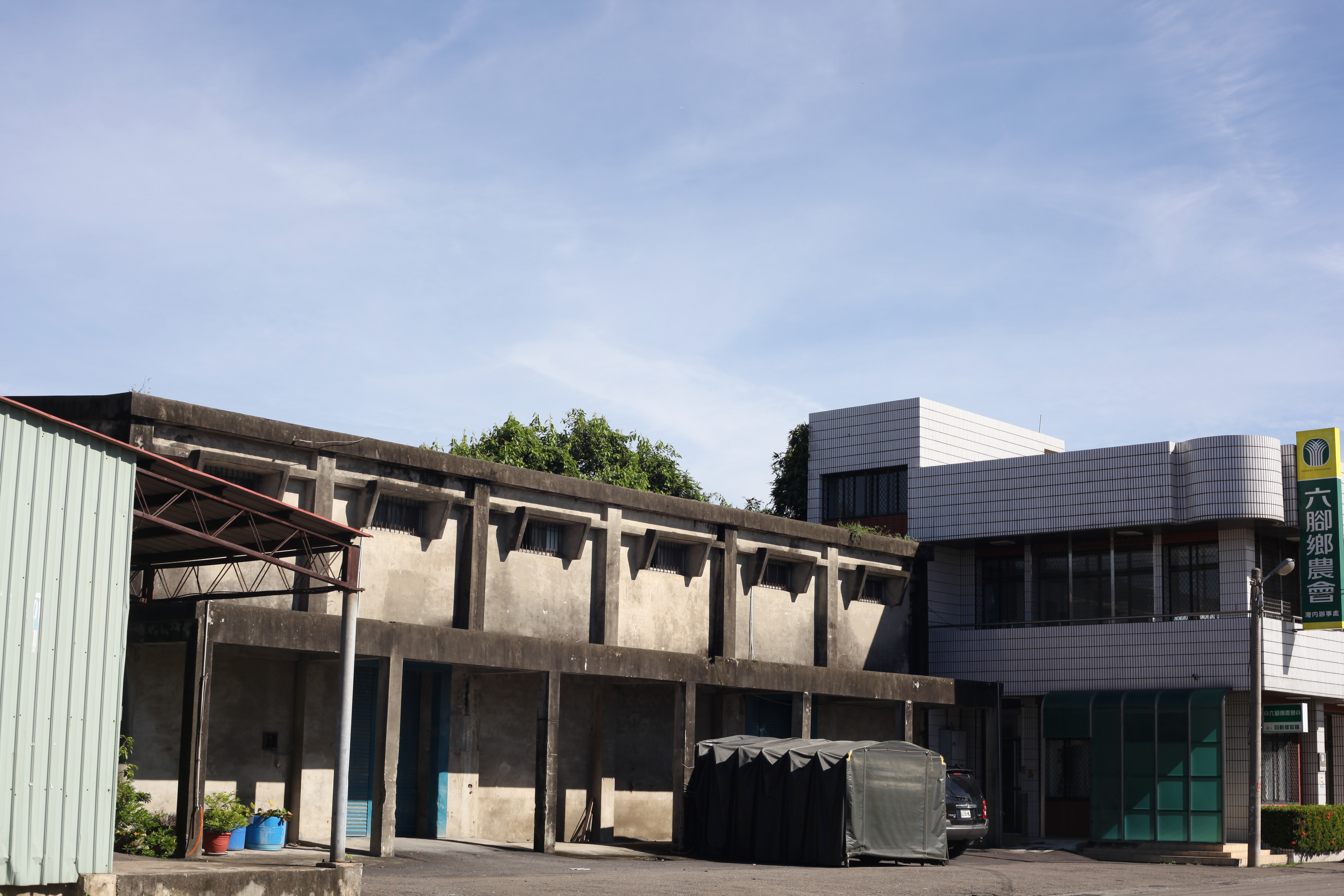 嘉義縣六腳鄉農會倉庫